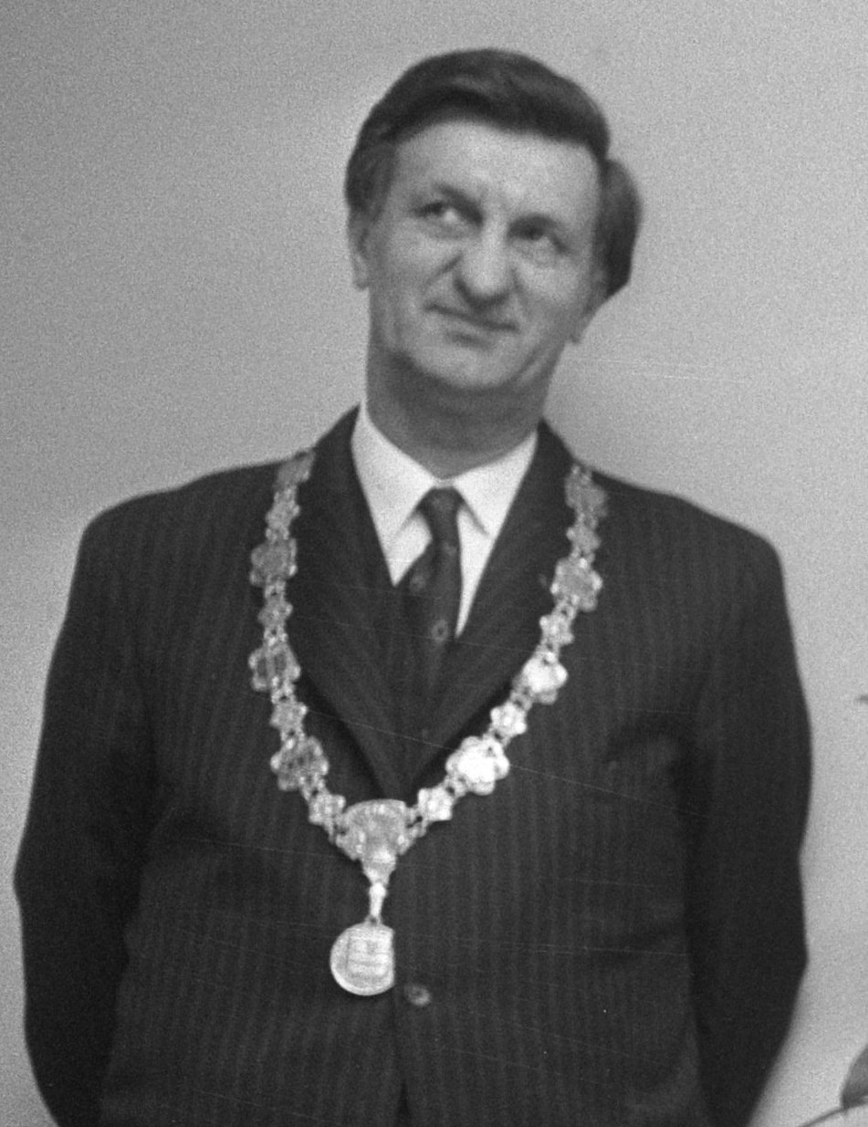 Minister De Gaay Fortman (rechts) met burgemeester Van Stam